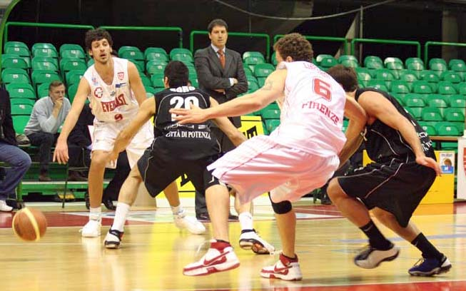 Mandela Forum Firenze in occasione del match Firenze Potenza della stagione 2007/08 2008, Firenze